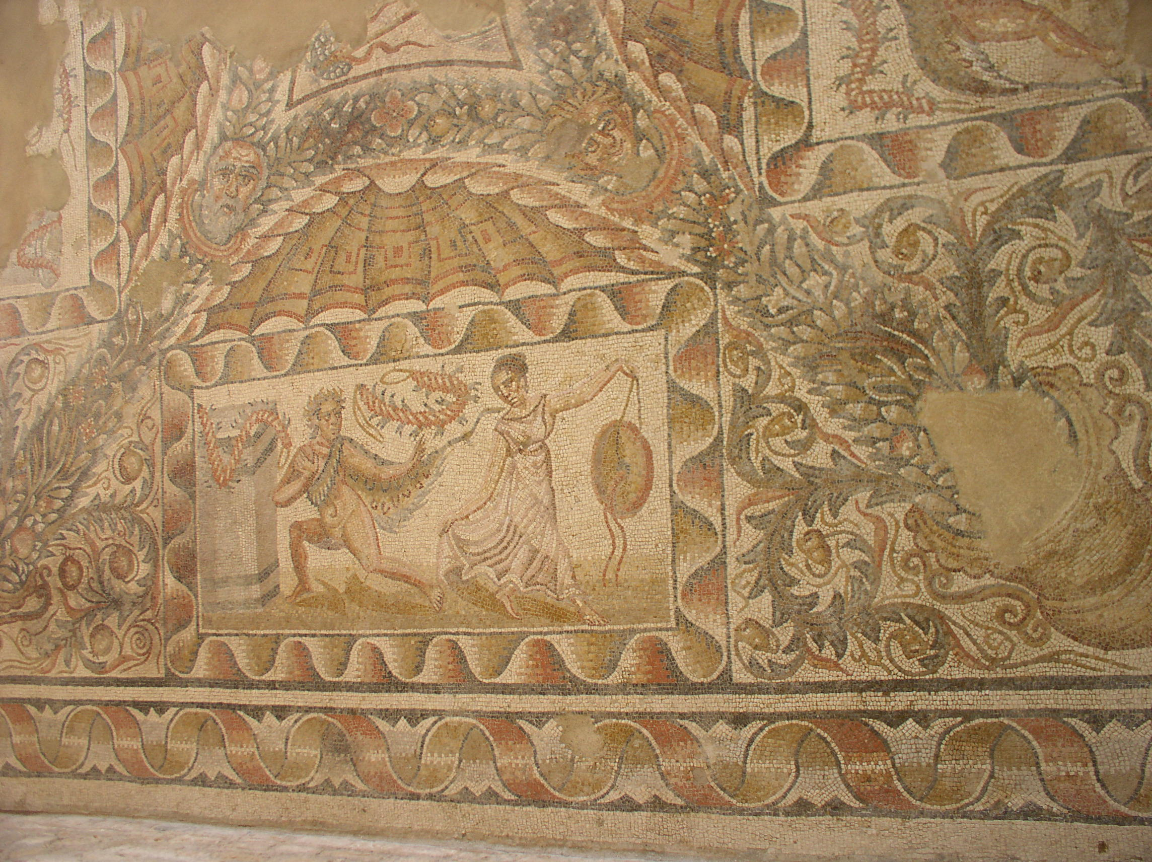 Dettaglio del "Mosaico dei satiri e delle menadi" della villa romana del Tellaro a Noto (Siracusa).